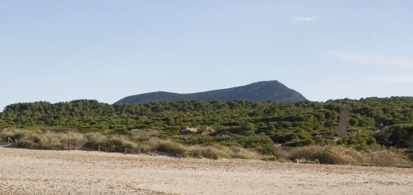 Blick von S'Arenal de Sa Canova, Arta, Mallorca, Spanien.